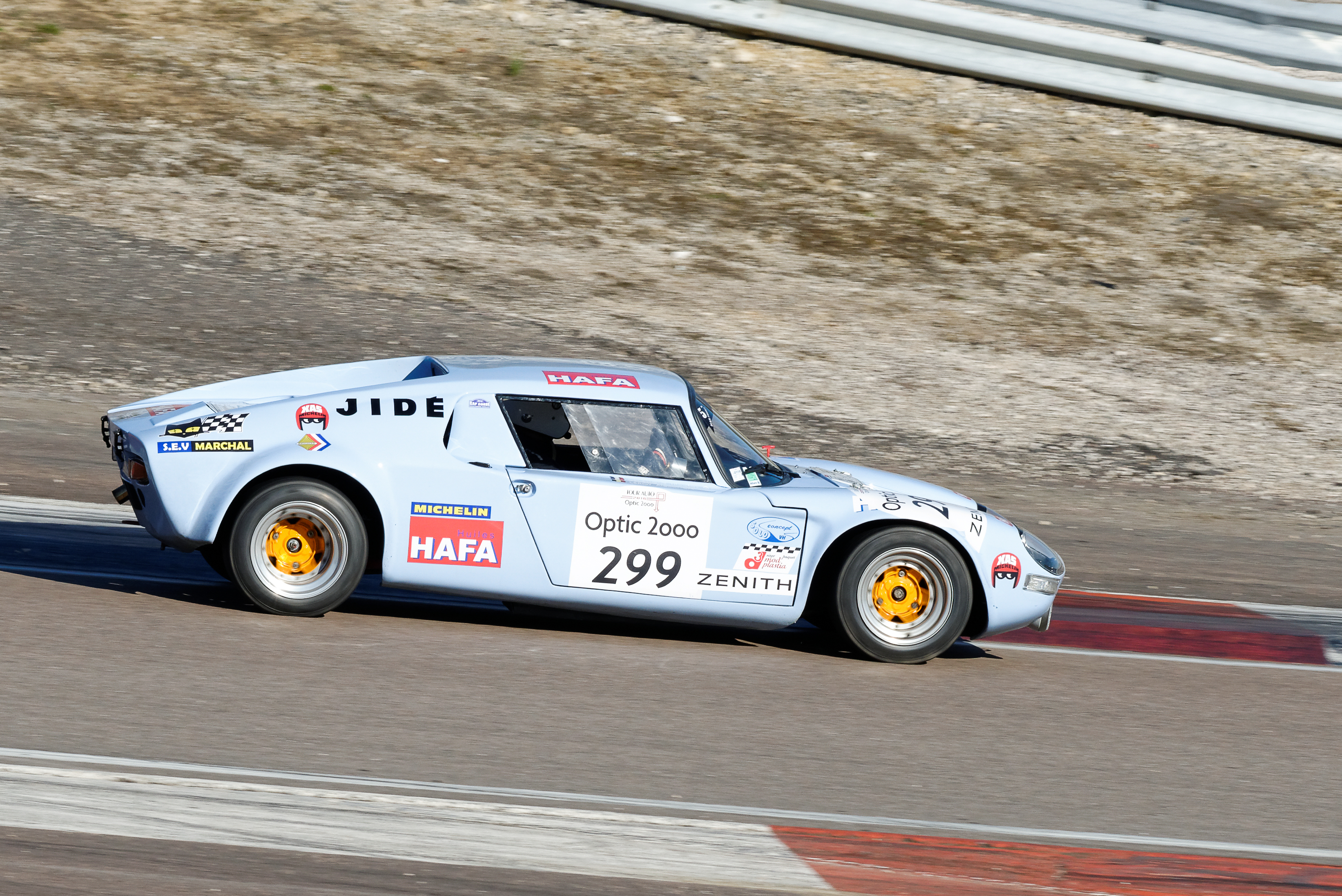 Jidé 1300 1971 - Tour Auto Optic 2000, année 2016 - Étape sur le circuit de Dijon-Prenois (Côte d'Or, Bourgogne-Franche-Comté, France).